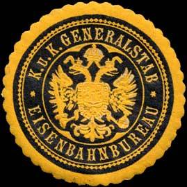 Sealing stamp Title: K.u.K. Generalstab-Eisenbahnbureau Description: gelb, schwarz, geprägt Place: size: 4 cm